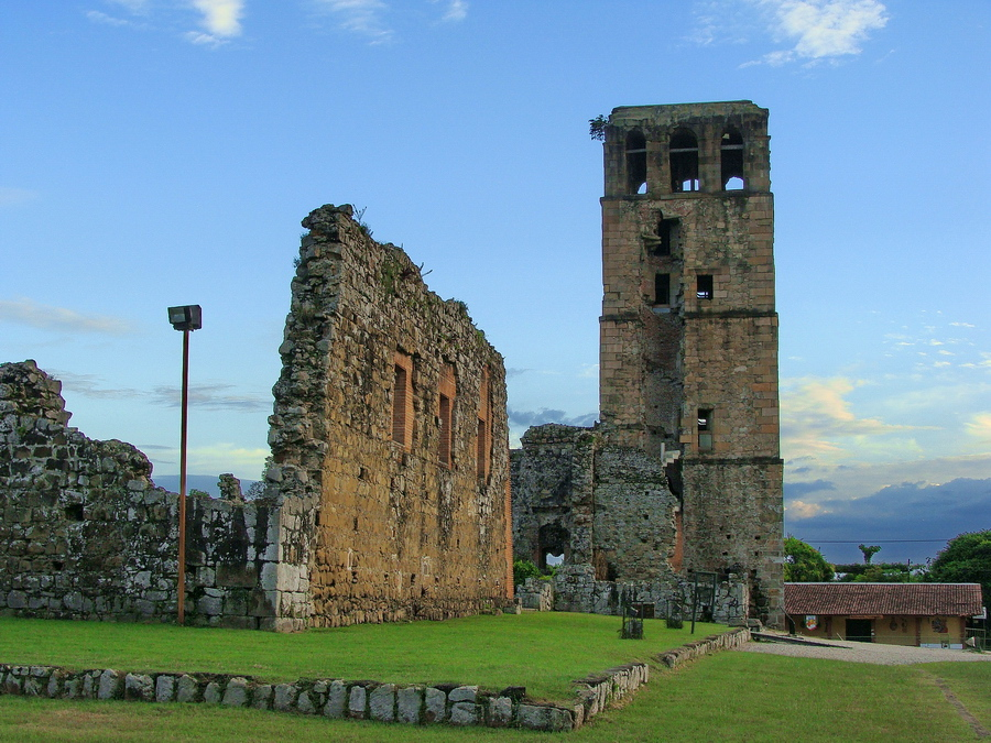 Torre de la catedral de Panamá viejo